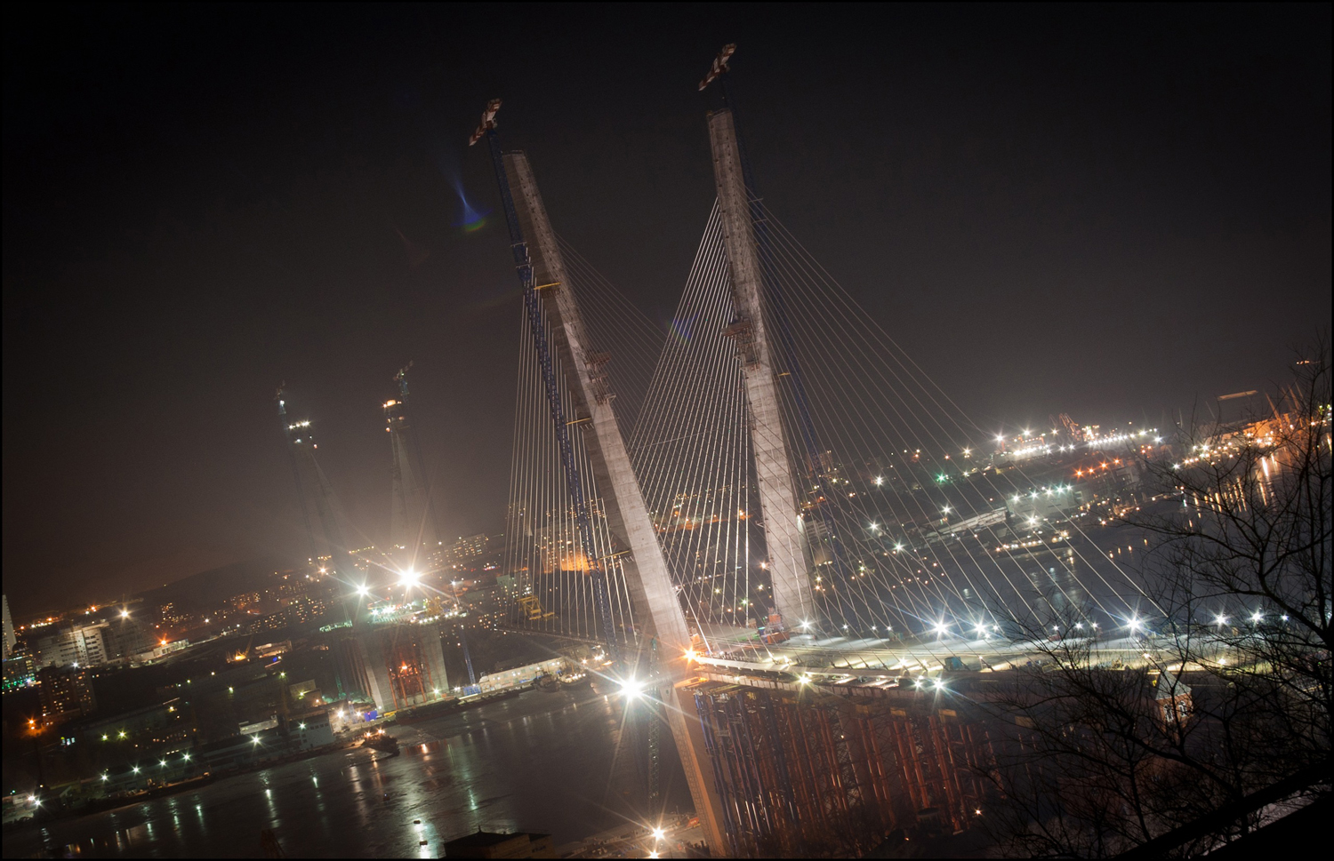 строящийся вантовый мост во Владивостоке